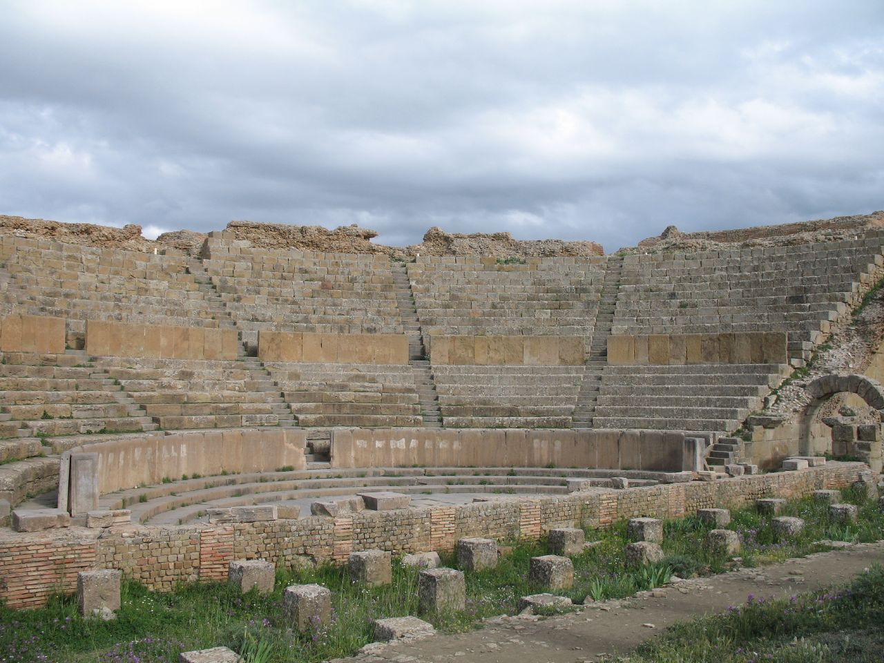 Ruines romaines de Timgad (Wilaya de Batna, Algérie). Vue sur le théâtre.